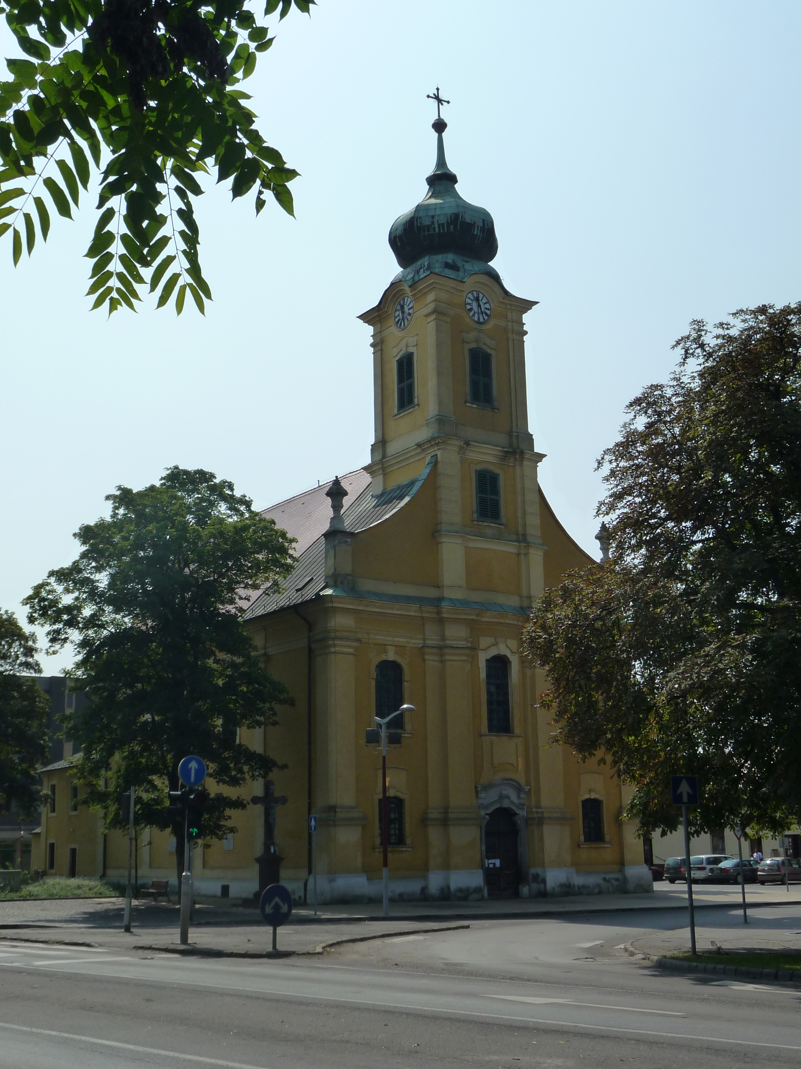 A Szent Adalbert plébániatemplom Hatvanban